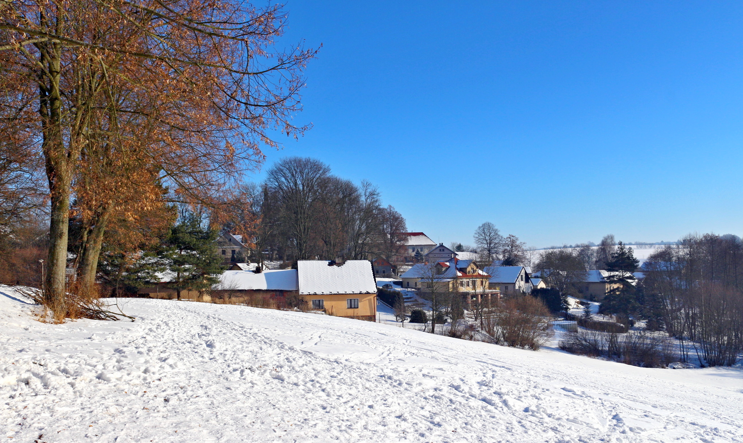 Úžice